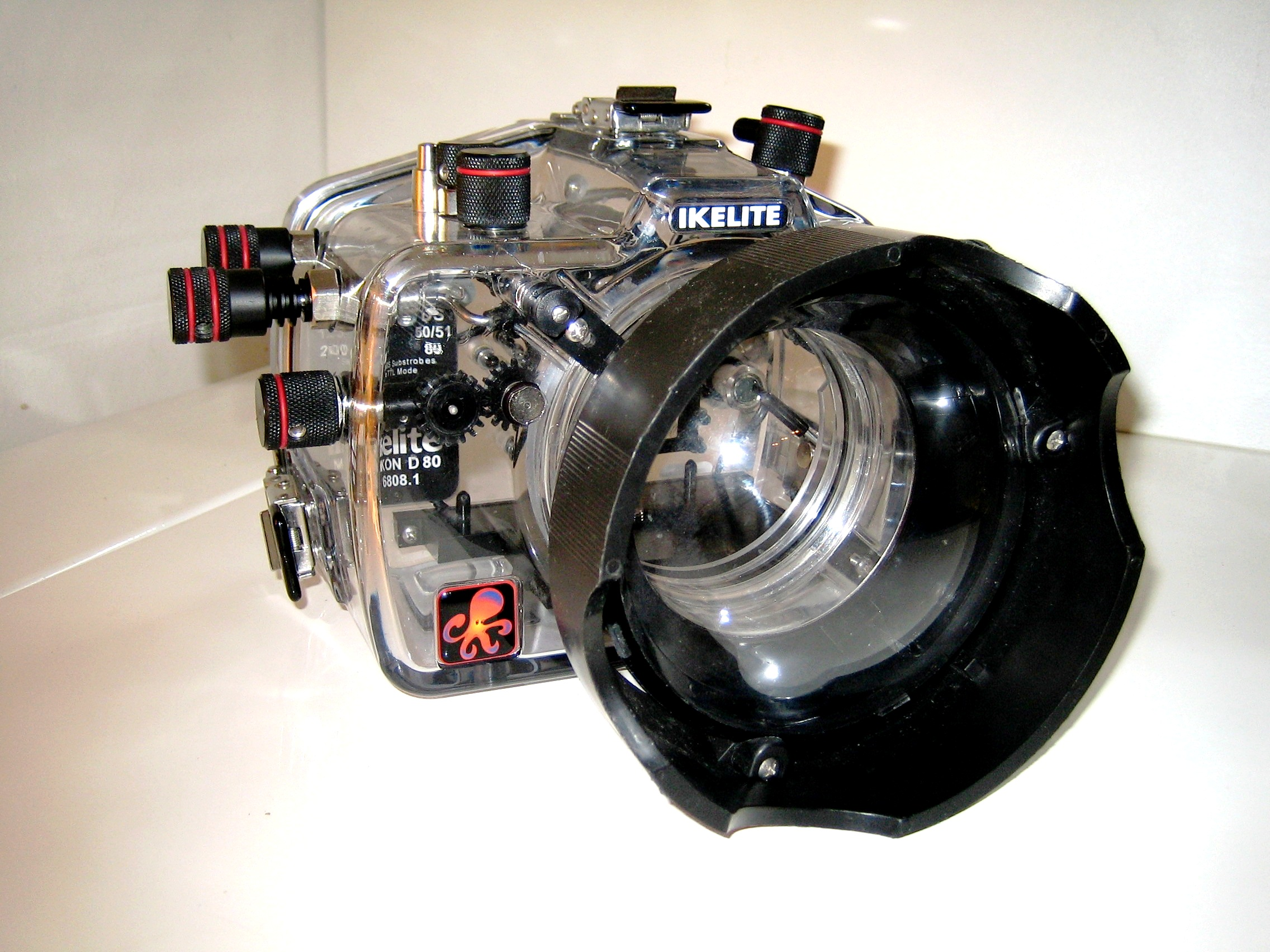 Ikelite housing for Nikon D80